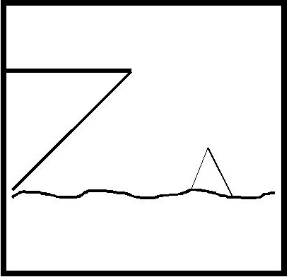 Drudel: Eine Nachbildung von dem Cover des Frank Zappa Albums Ship Arriving Too Late to Save a Drowning Witch (dt.: Das Schiff kommt zu spät um eine ertrinkende Hexe zu retten)